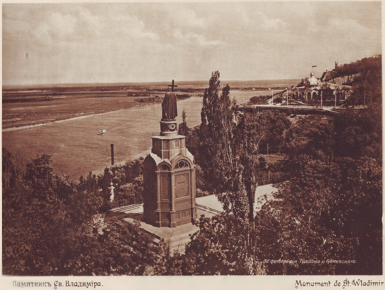 Пам'ятник Св.Володимиру Київ 1911